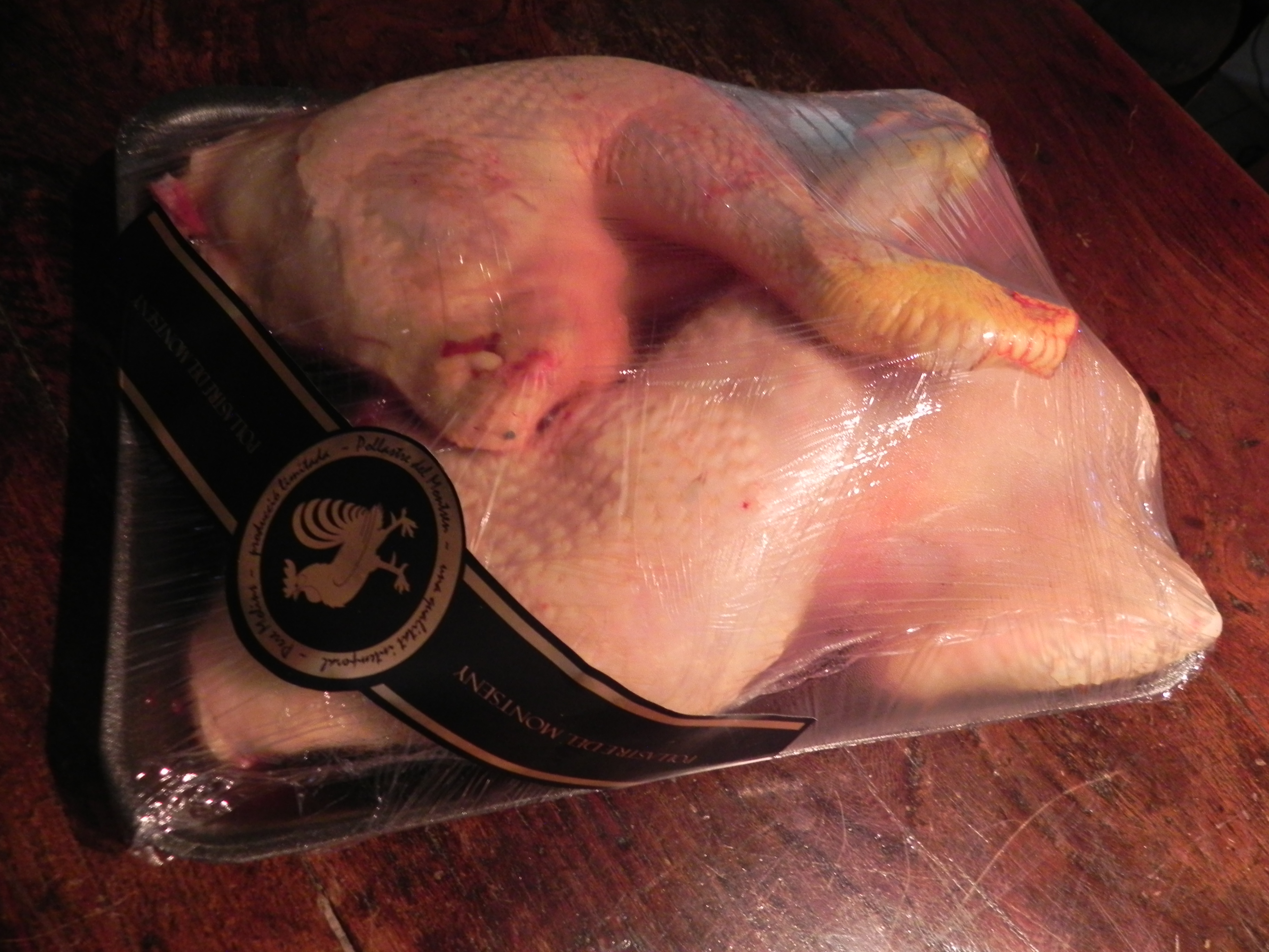 Productes de pagès